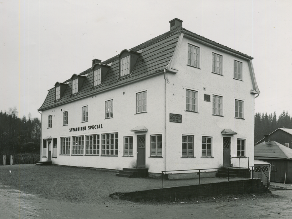 Picture from Gånghester, Sweden in the 1930's. The building is the home of Syfabriken Special, a textile company specialized in shirts started by Annie and David Petterson. The company later changed their name and is today known as the global shirt brand Eton Shirts.